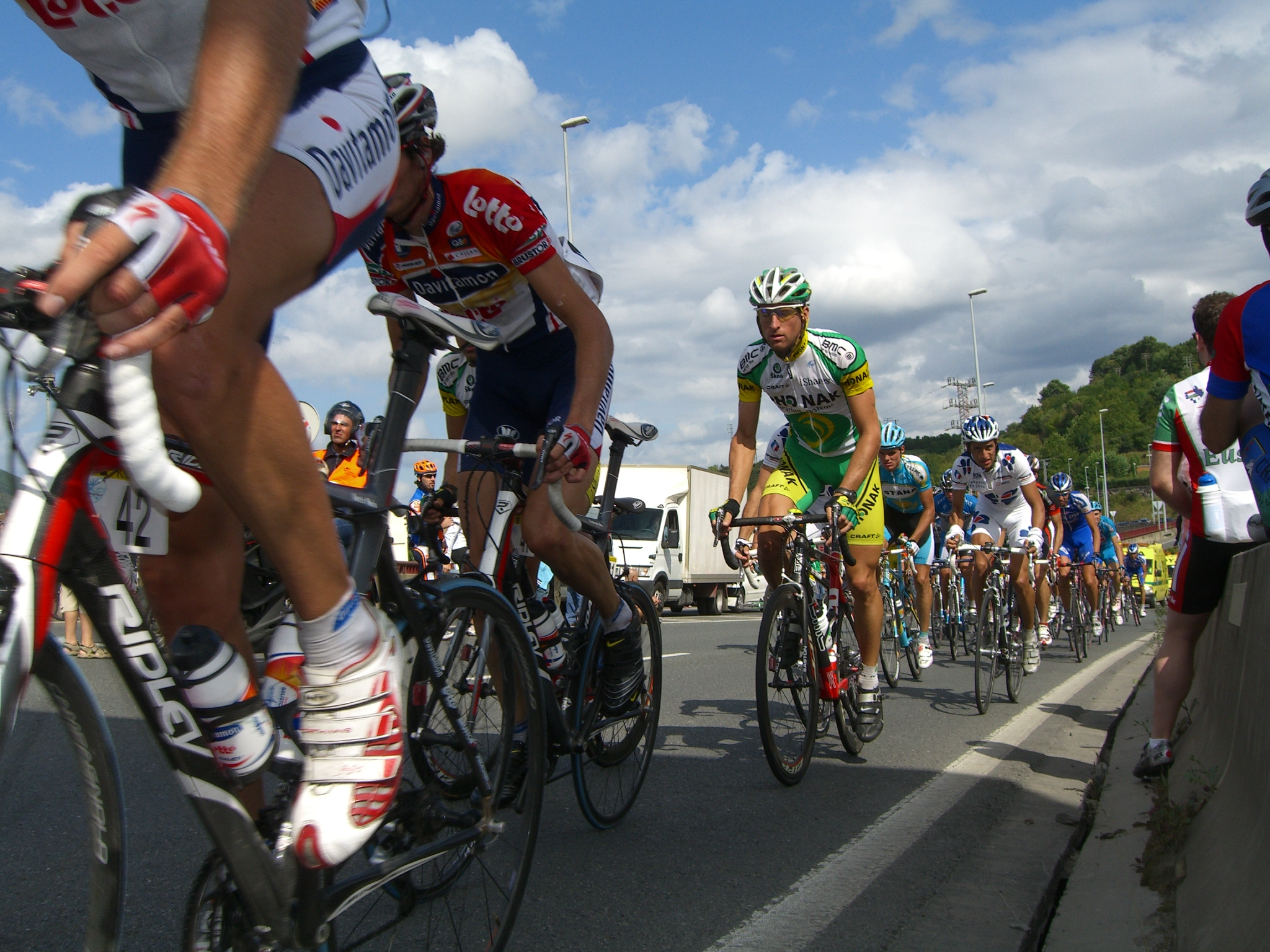 Esta foto ilustra esta una entrada en este interesante blog: Por cierto, no estoy para nada de acuerdo con el contenido del post.